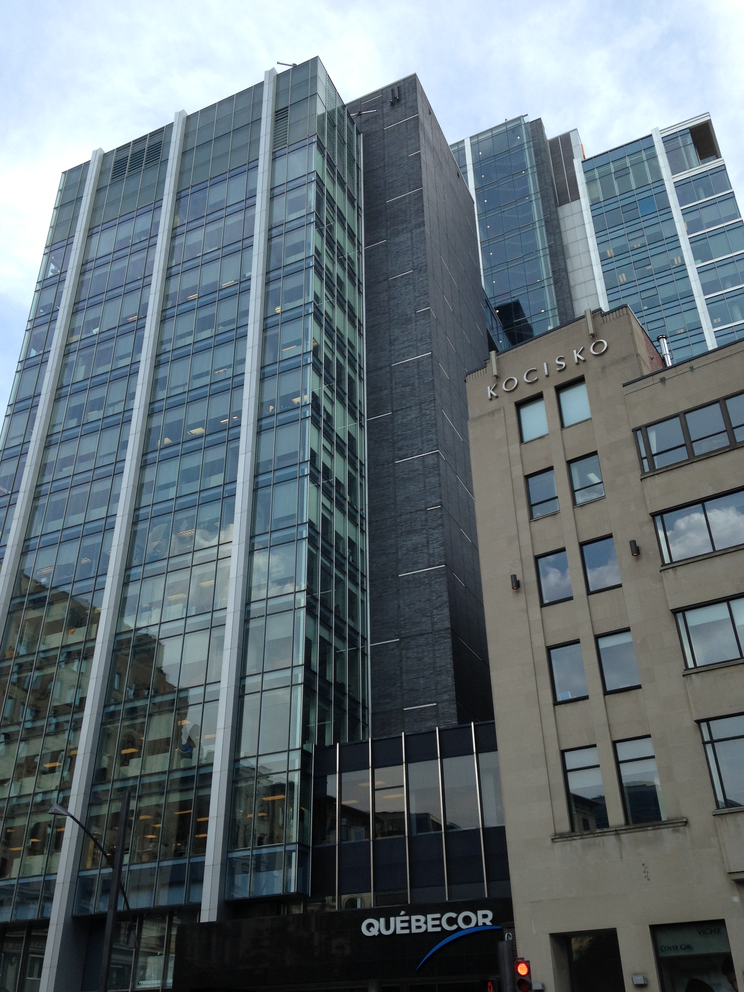 Quebecor